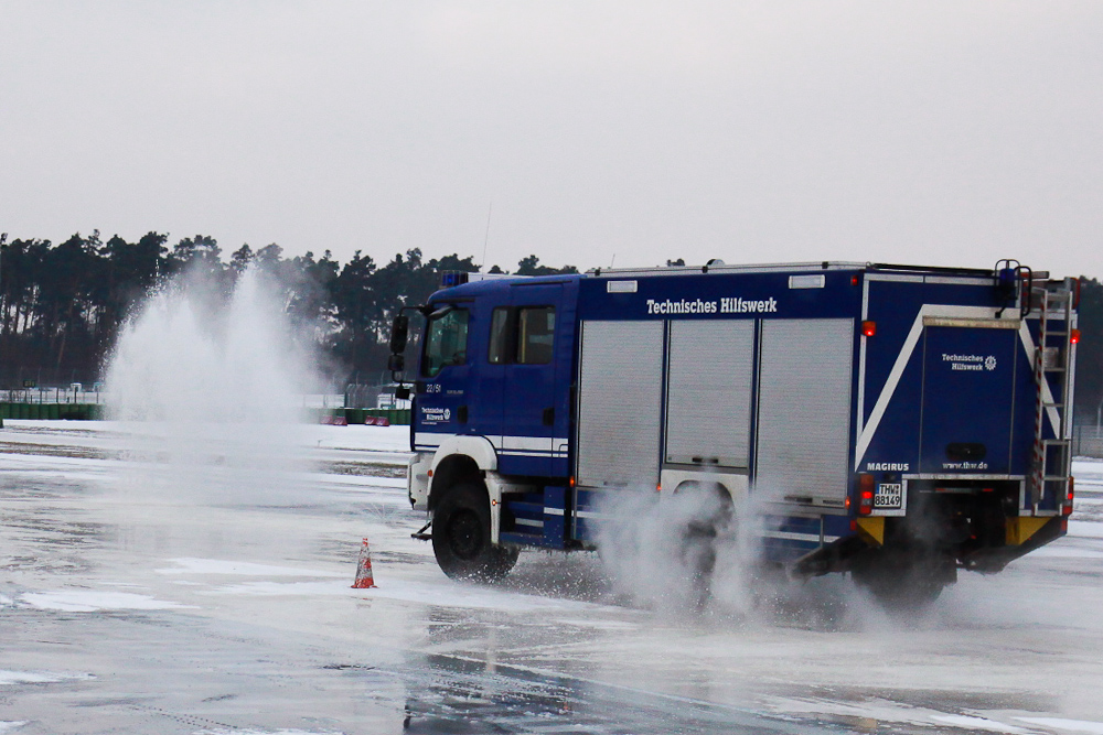 Da rauchts..